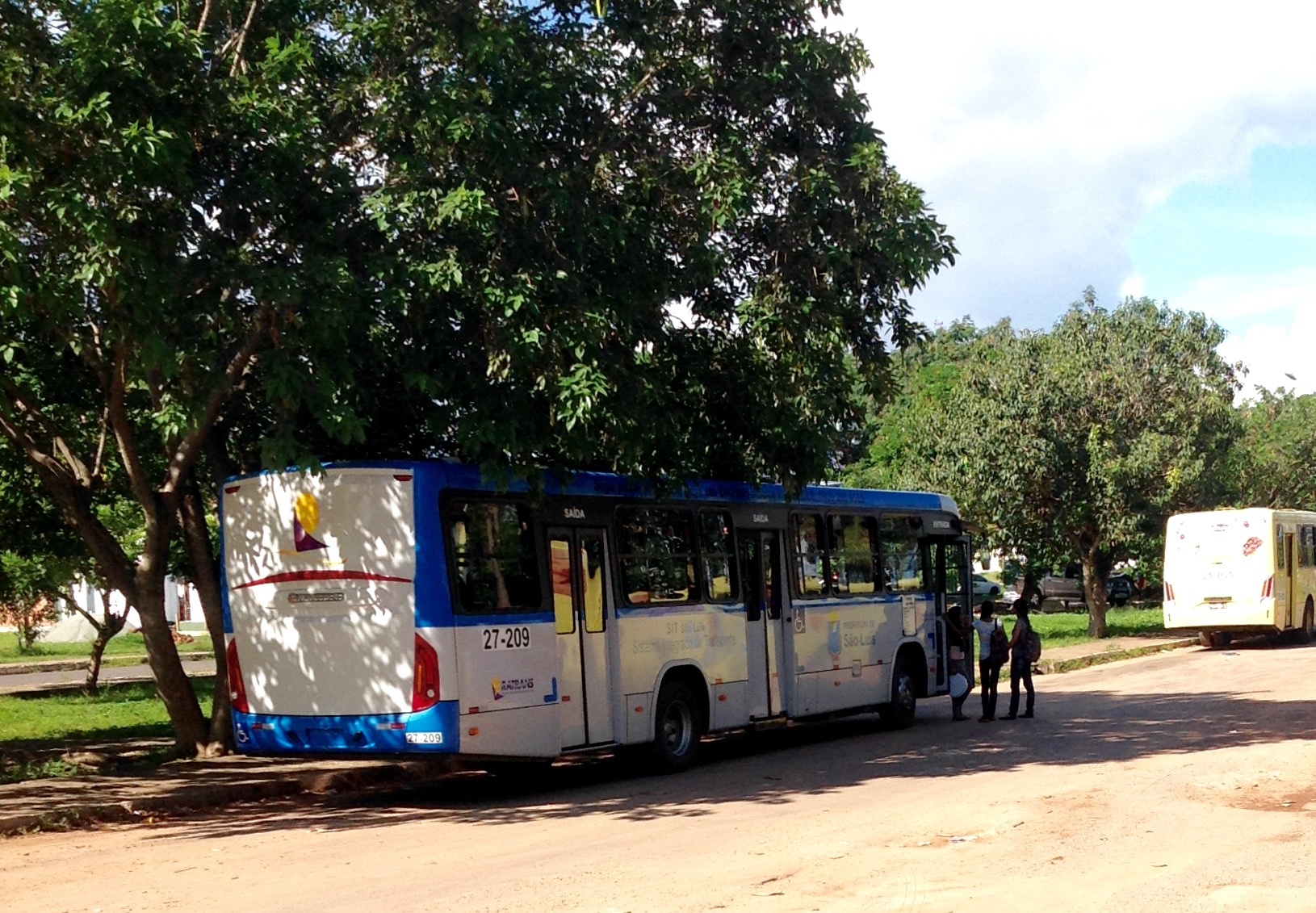 Ônibus de São Luis, Brasil